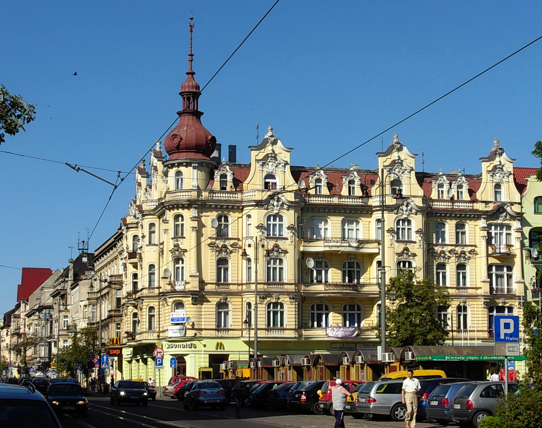 Kamienica J. Święcickiego przy Plac Wolności 1 w Bydgoszczy